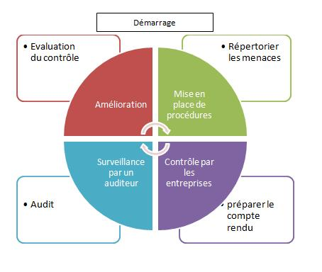 1ère étape : Mise en place de procédures en vue de la certification 2ème étape : Contrôle interne de la fiabilité des processus 3ème étape : surveillance par un audit 4ème étape : Amélioration des procédures Audit Evaluation du contrôle Démarrage Amélioration Mise en place de procédures Surveillance par un auditeur Contrôla par les entreprises préparer le compte rendu Répertorier les menaces